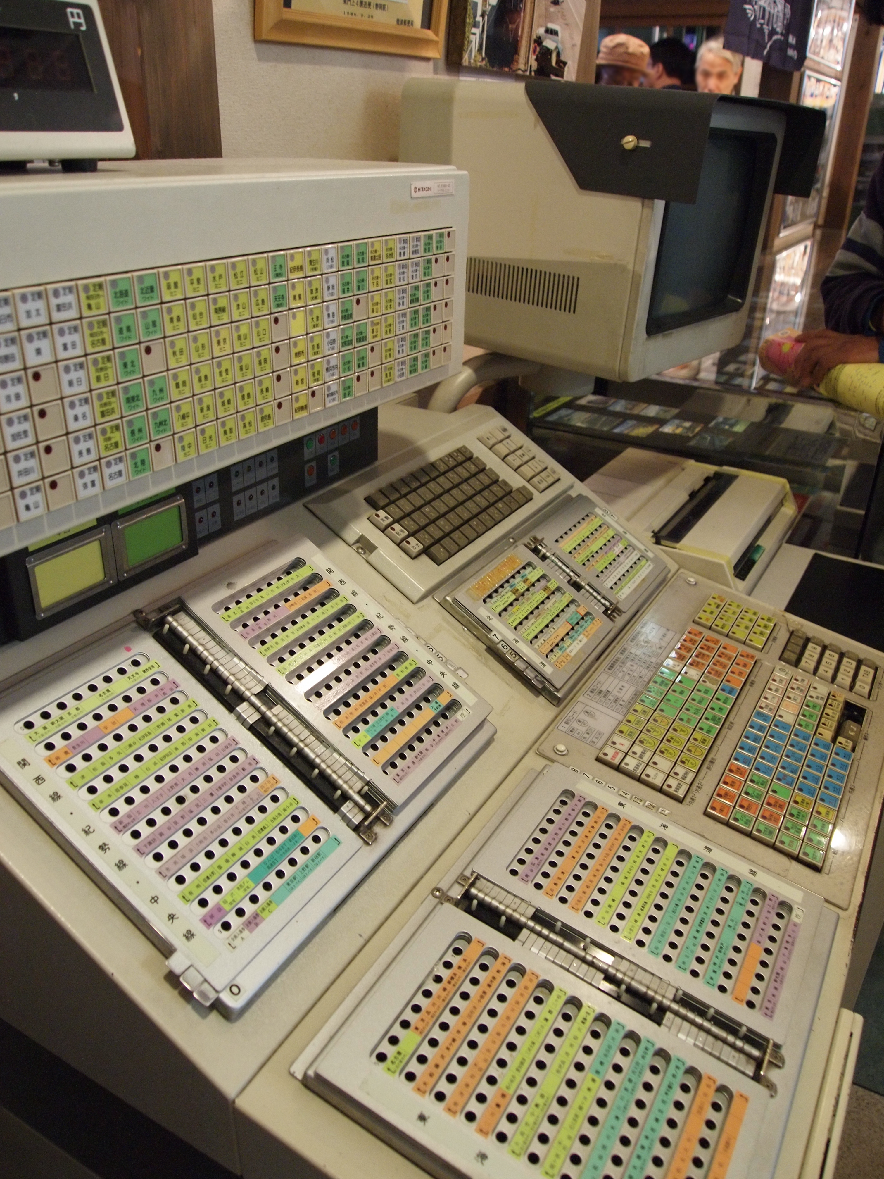 M型マルス端末。佐久間レールパークにて撮影。